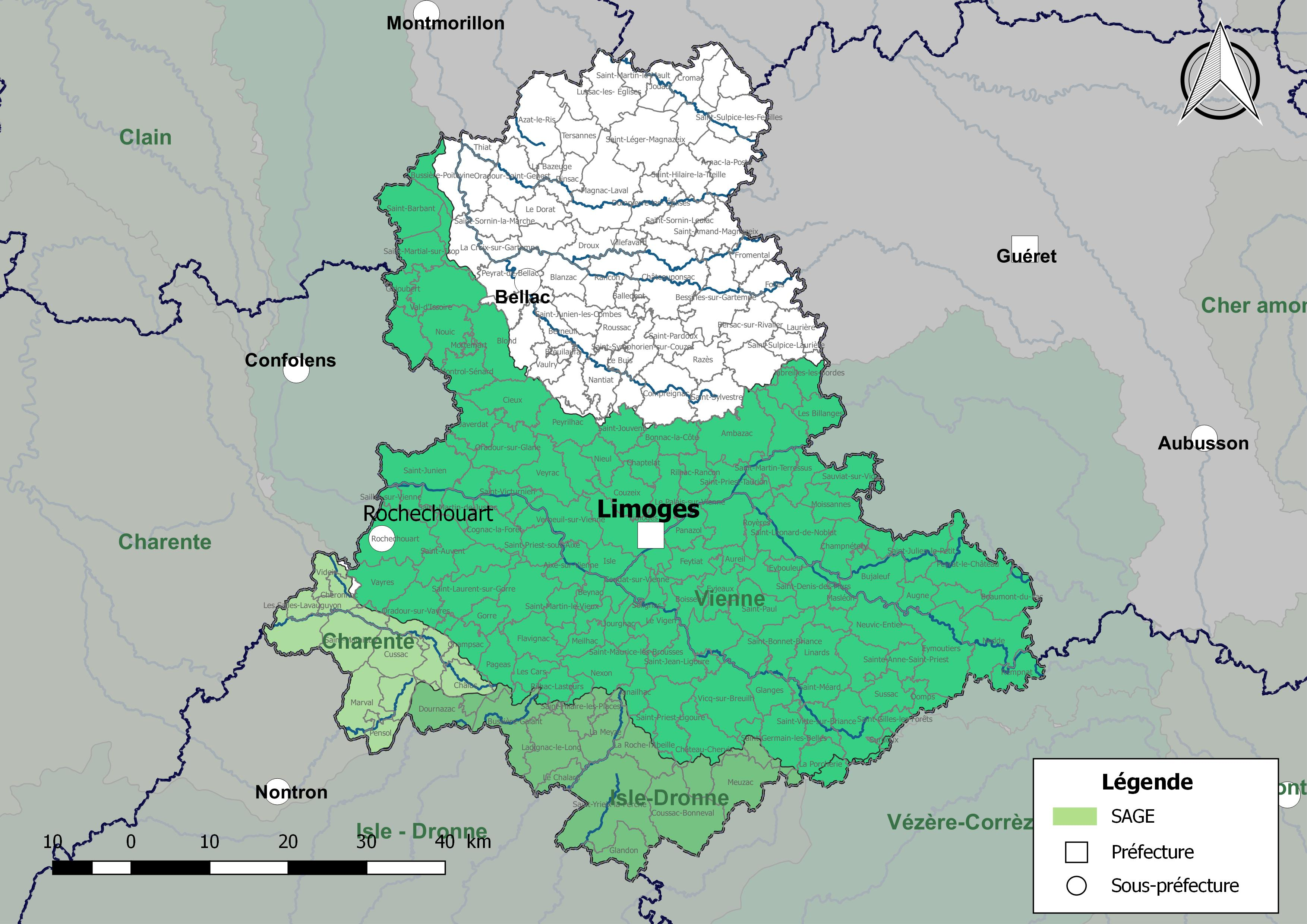 Carte des schémas d'aménagement et de gestion des eaux (SAGE) concernant le département de la Haute-Vienne (France) au 1er janvier 2018.